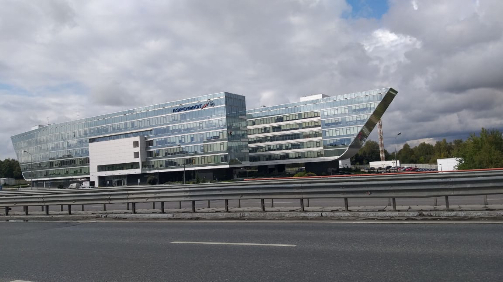 Главный офис "Аэрофлота". Международное шоссе, 31, стр. 1